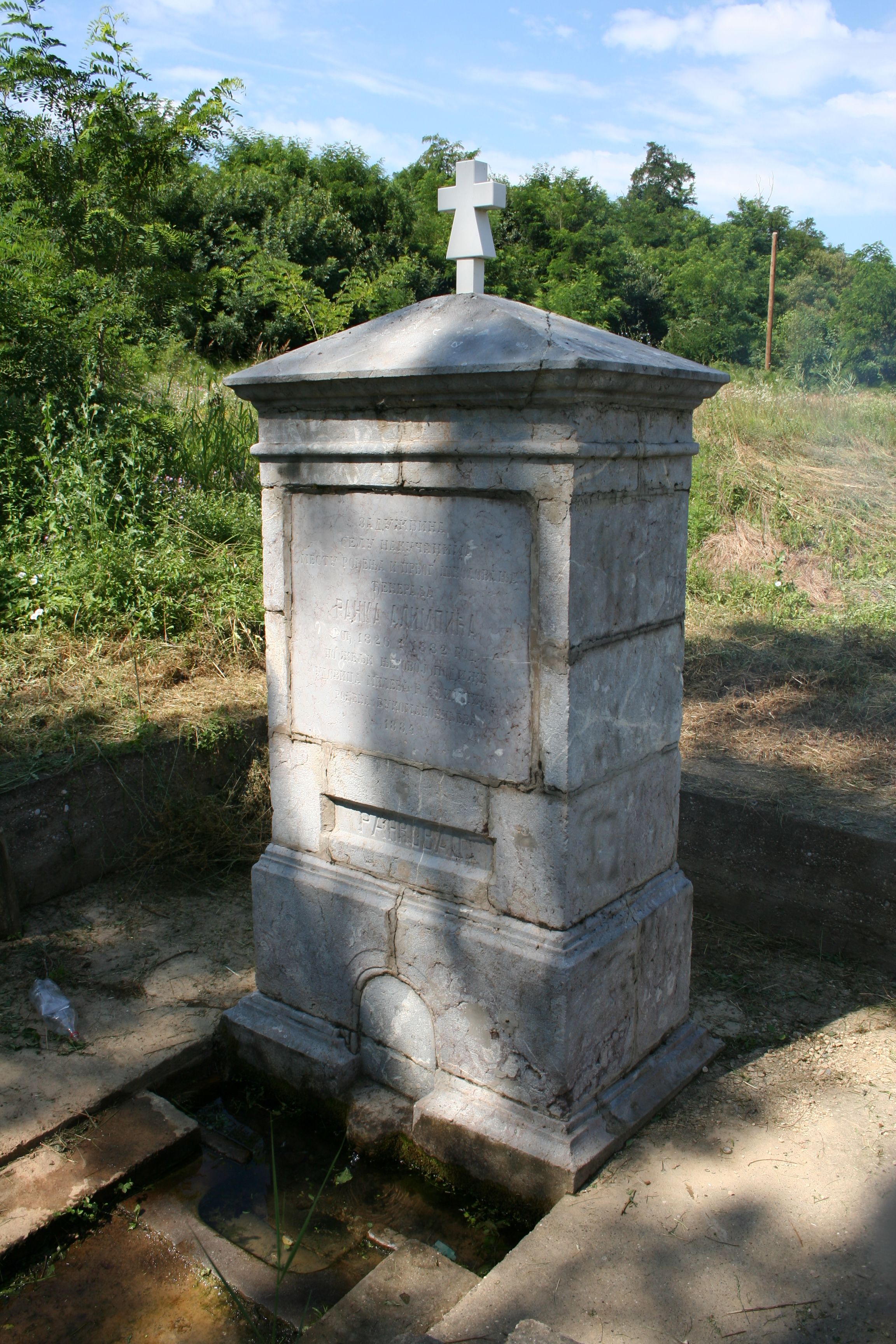 Spomen česma, Nakučani